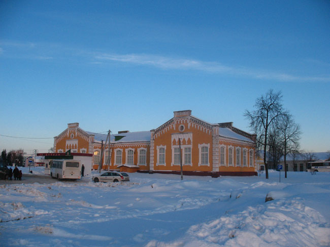 Добруш. Добрушскі раённы краязнаўчы музей.